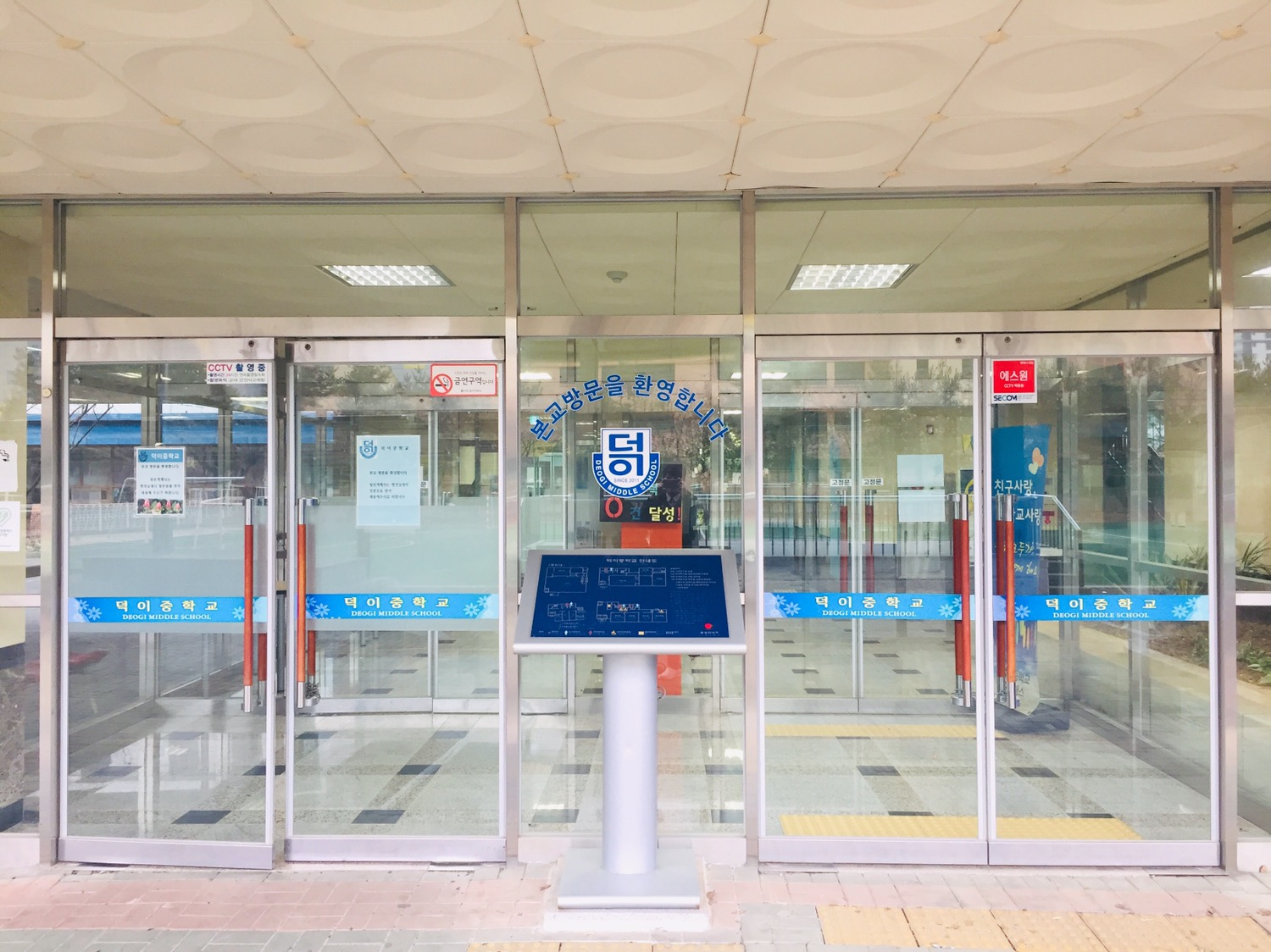 경기도 고양시 덕이동 덕이중학교 본관 출입문